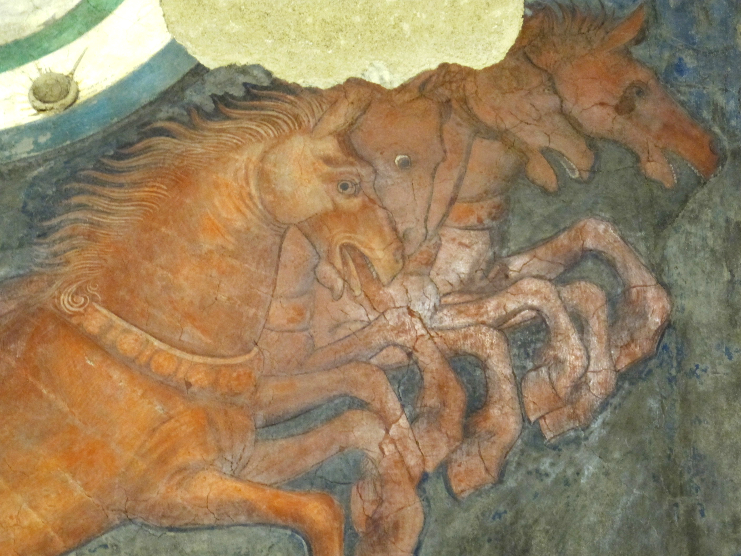 Sala delle arti liberali e dei pianeti 27.2 sole